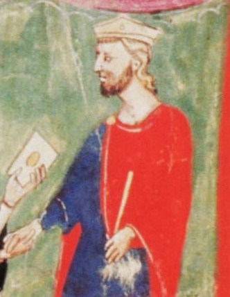 Dibujo del rey Pedro III de Aragón.